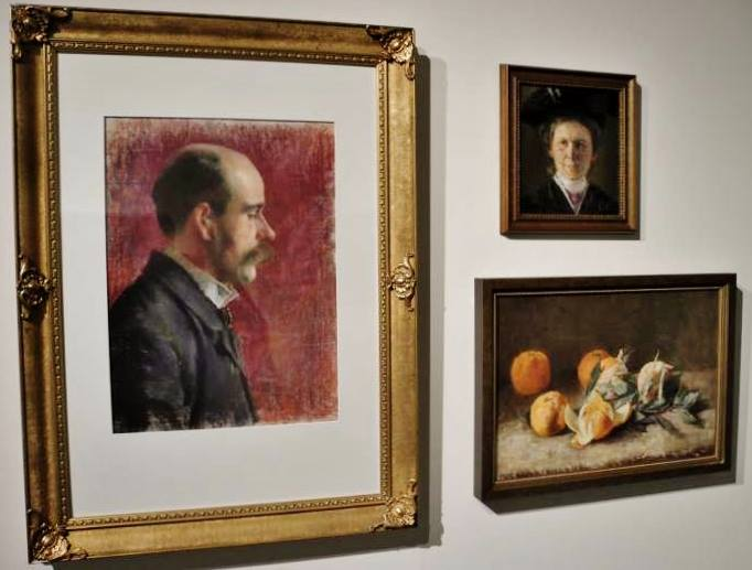 Männerporträt (Pastell, Selbstbildnis (Öl) und Stillleben (Öl) der Malerin Erna von Dobschütz als Beitrag zur Eröffnungsausstellung der "Galerie der Moderne" in der Kaisertrutz in Görlitz